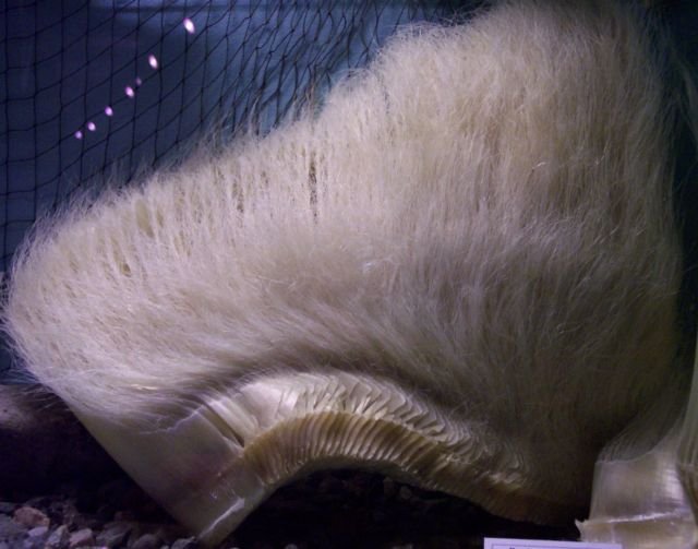 Barte eines Wals, eigenes Bild, GFDL